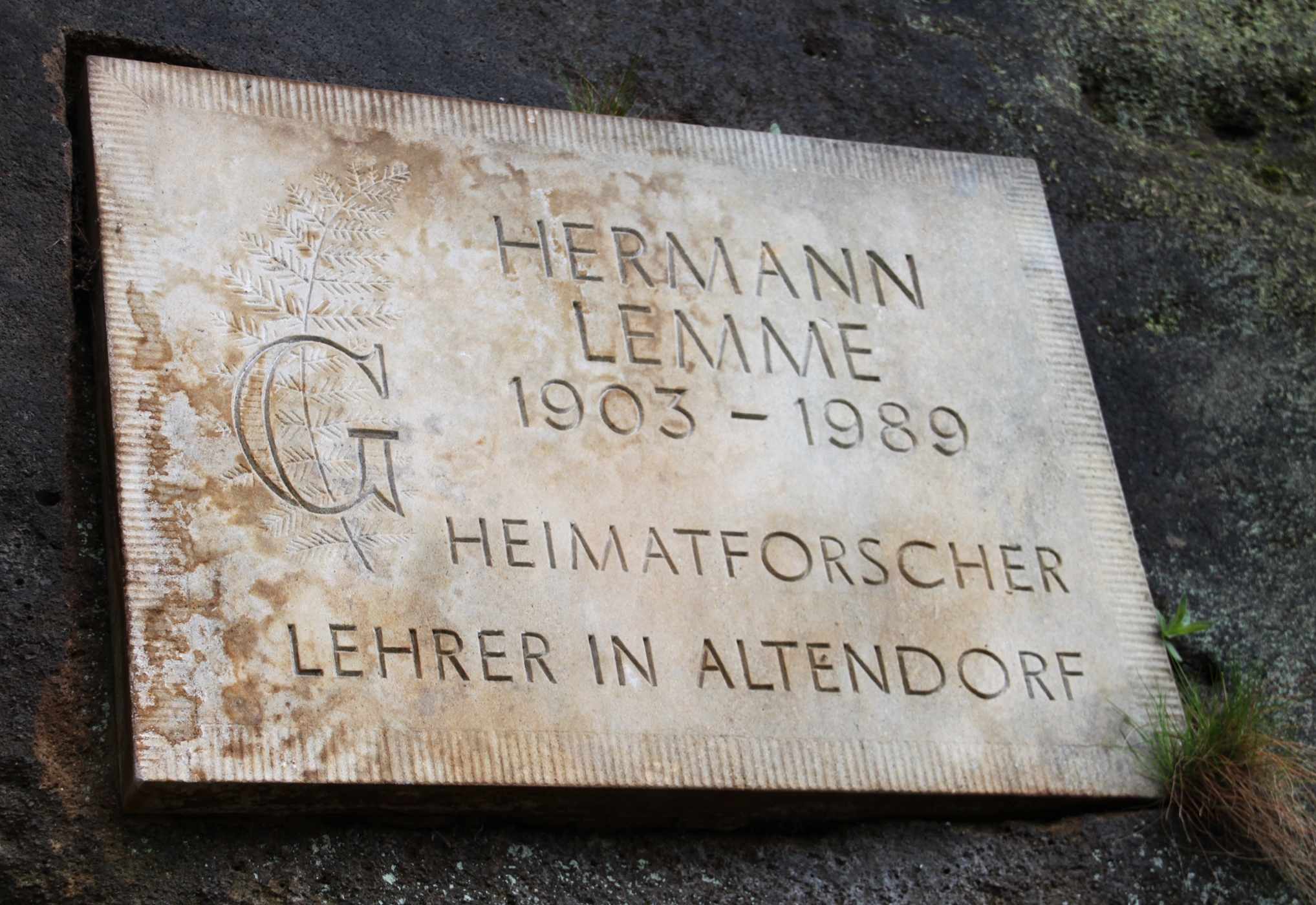 Gedenktafel für den Heimatforscher Hermann Lemme am Wanderweg von Altendorf ins Kirnitzschtal.